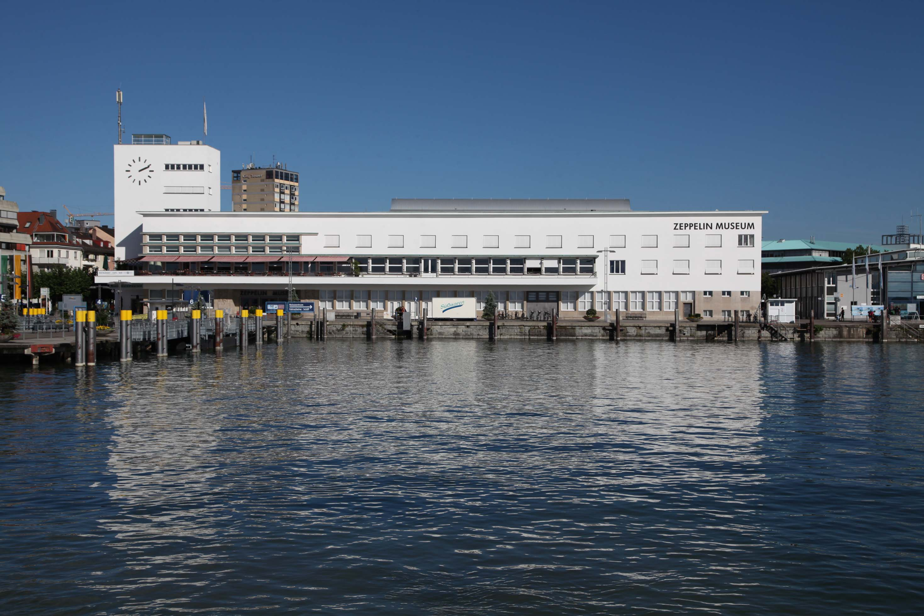 Das Zeppelin Museum im denkmalgeschützten ehemaligen Hafenbahnhof von Friedrichshafen © Zeppelin Museum, Foto: Michael Fischer